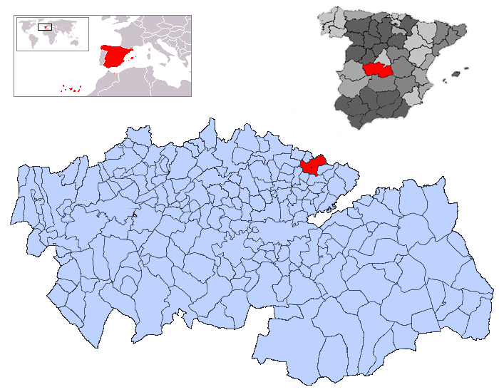 Illescas en la provincia de Toledo